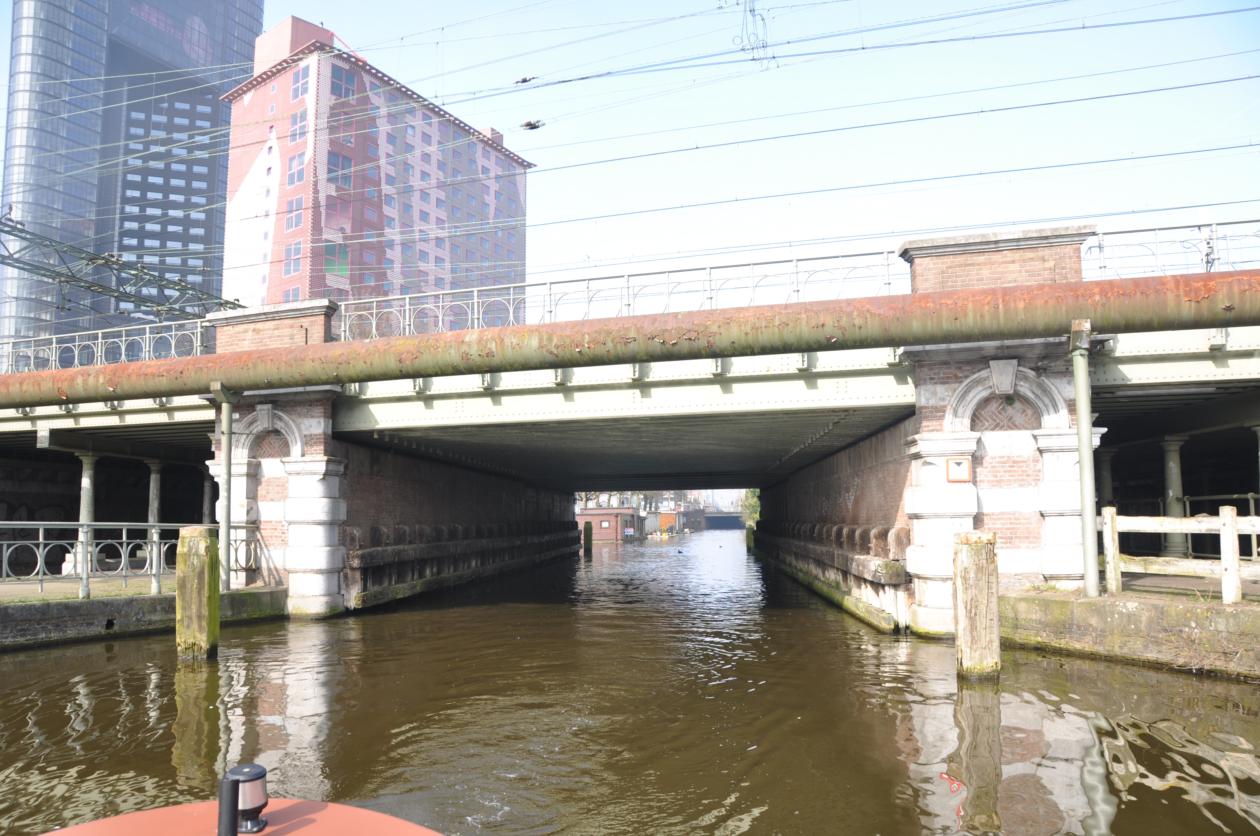 De spoorbrug bij Hollands Spoor in Den Haag.